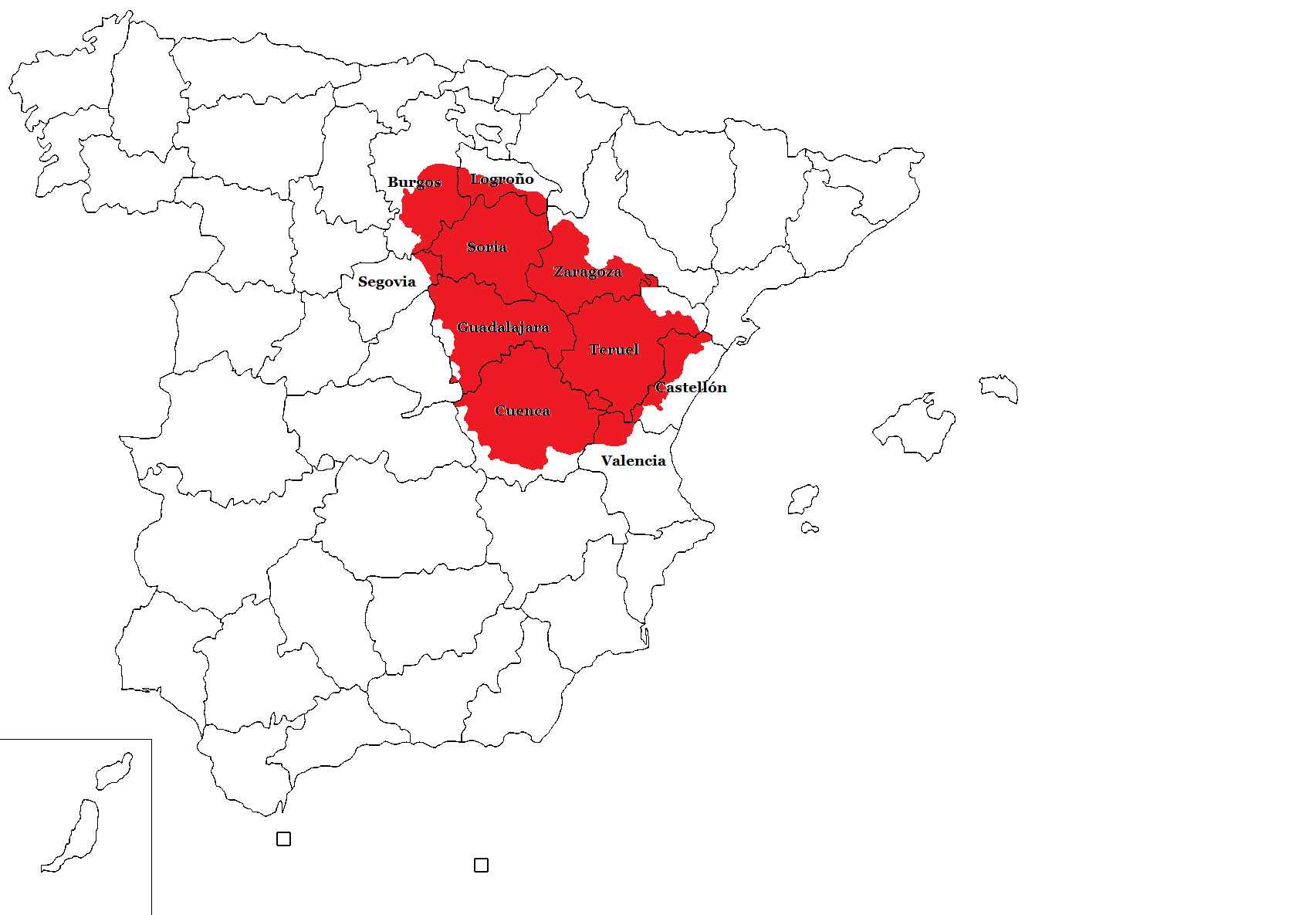 Extensión de la Serranía Celtibérica.